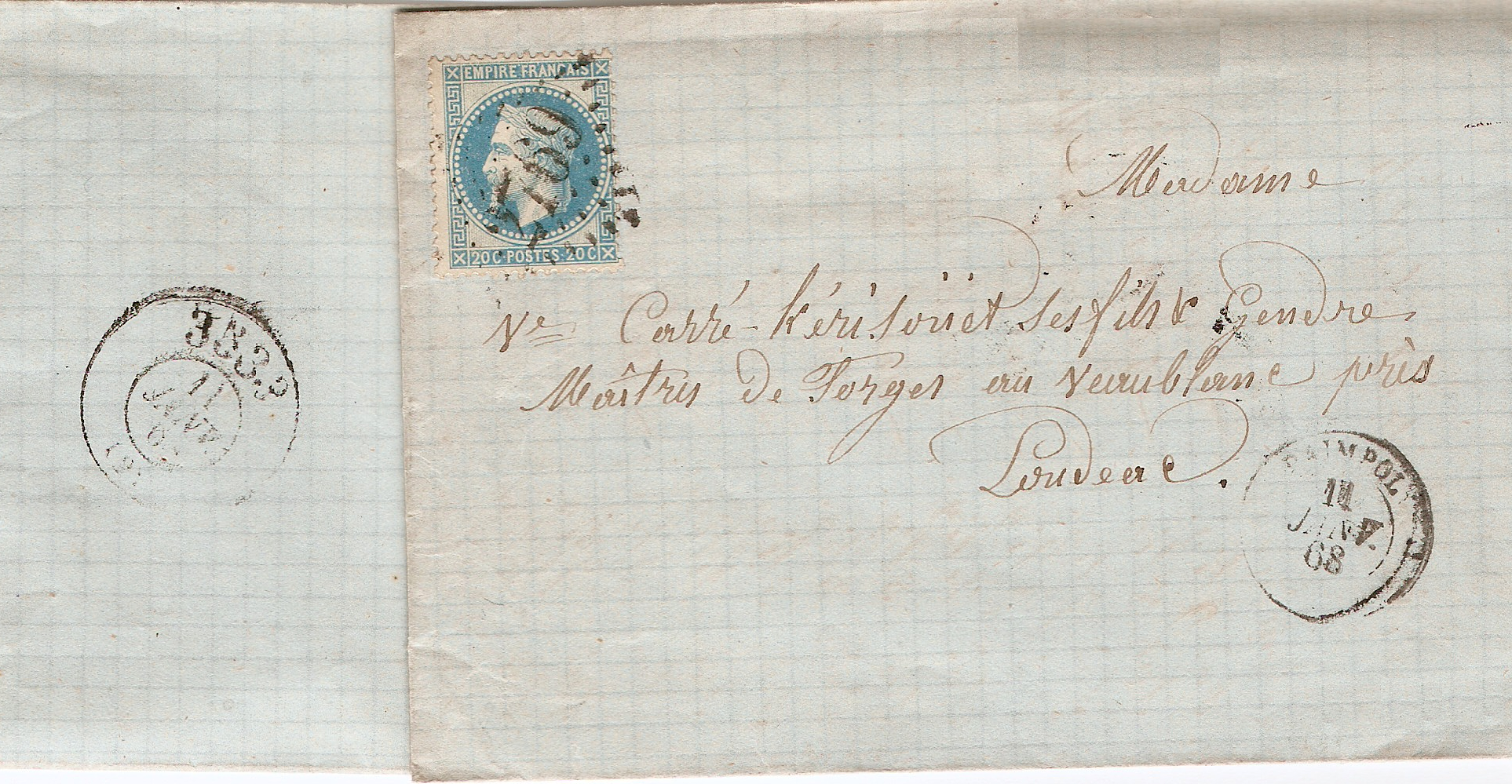 Lettre de France (Paimpol) affranchie avec un 20 c bleu Napoléon III de 1867, oblitérée avec un losange gros chiffres 2769, avec au verso un cachet bureau de passe 3533 {Saint-Brieuc)